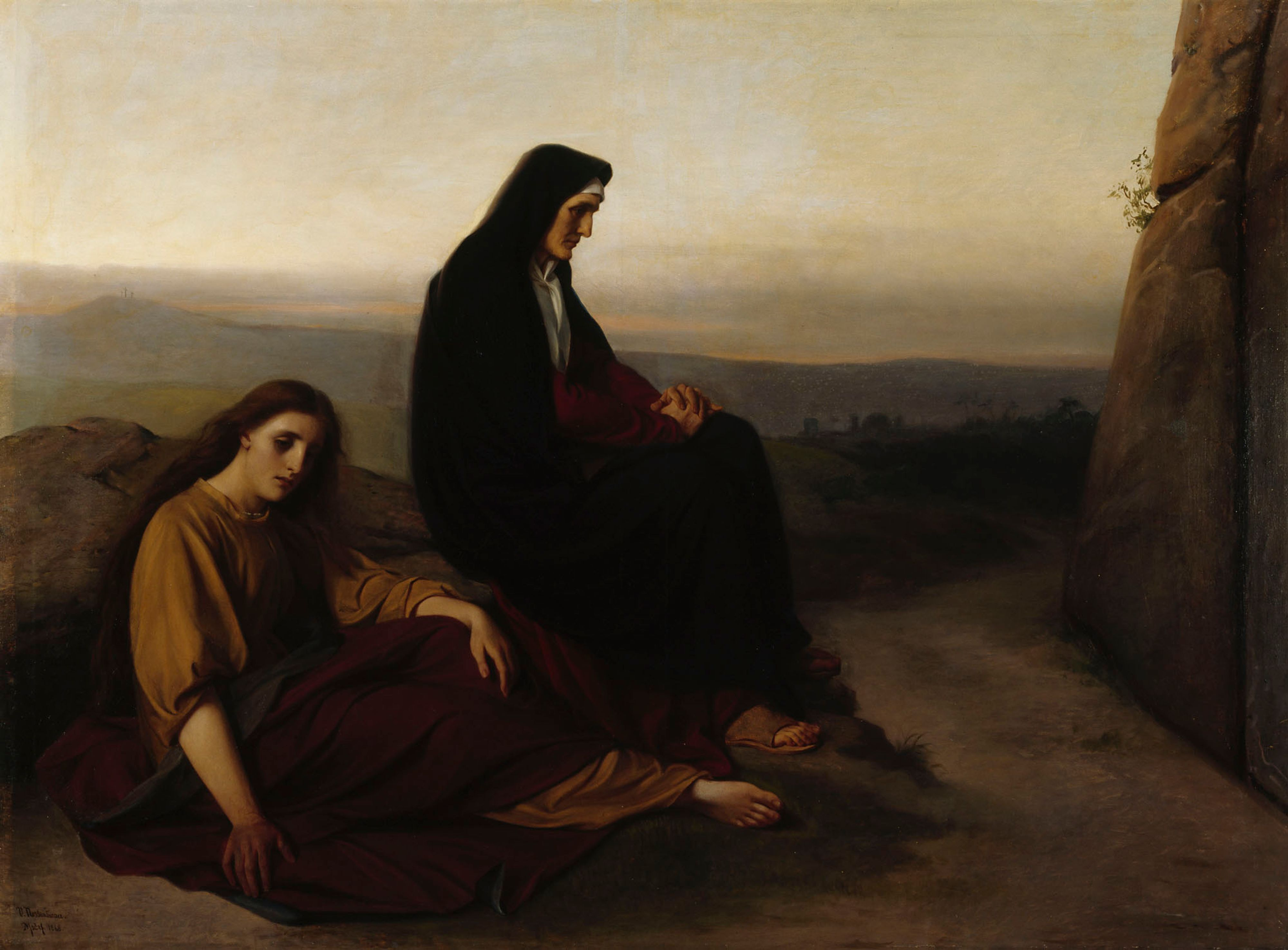 Victorine Nordenswanin maalaus, perustuu Philipp Veitin maalaukseen. Aiheena on Matteuksen evankeliumin kohta (Matt. 27:61), jossa Magdalan Marian ja toisen Marian kerrotaan istuneen vastapäätä Jeesuksen hautaa.